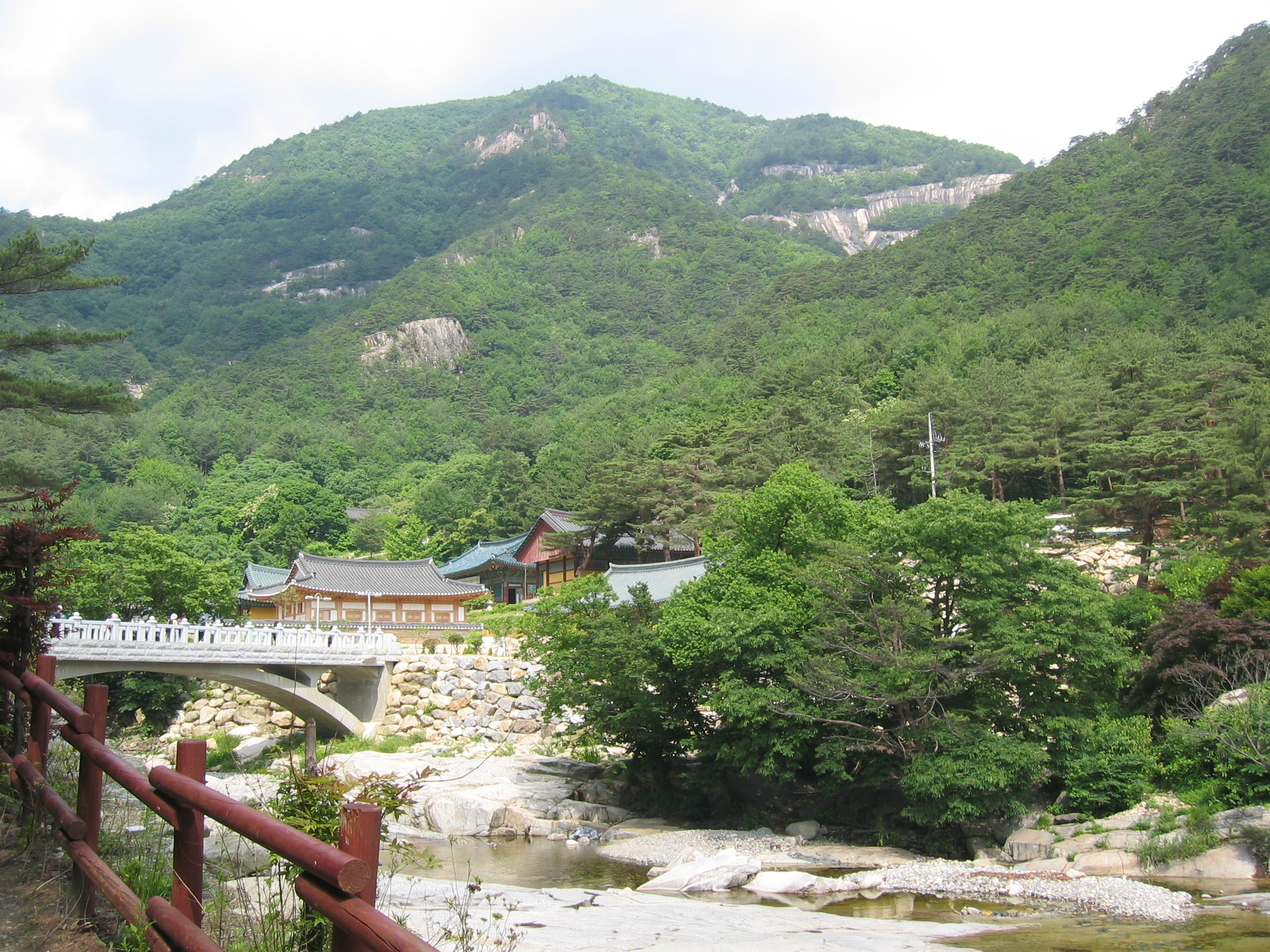 두타산과 주변에 있는 사찰인 삼화사